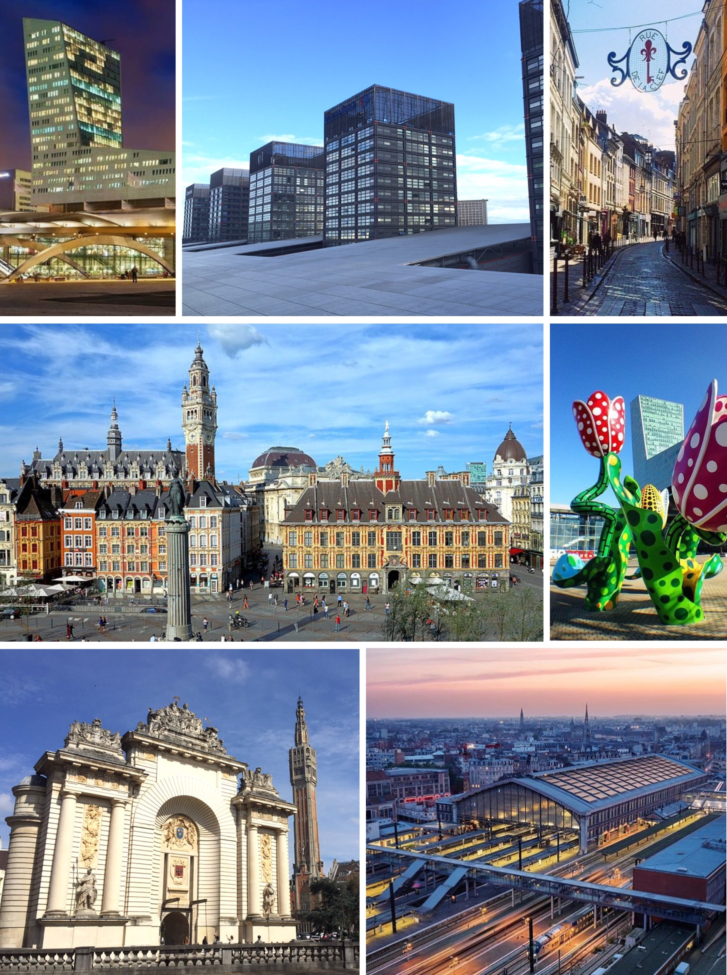 Montage photo avec des monuments de Lille (Nord) : la Tour de Lille, des tours d'Euralille, la Rue de la Clé dans le Vieux-Lille, la Grand'Place (Place du Général de Gaulle), les Tulipes de Shangri-La (sculpture de Lille 2004), la Porte de Paris et le Beffroi de l'Hôtel de ville, la gare de Lille-Flandres. File:Lille vue gd place.JPG - Velvet others are mine